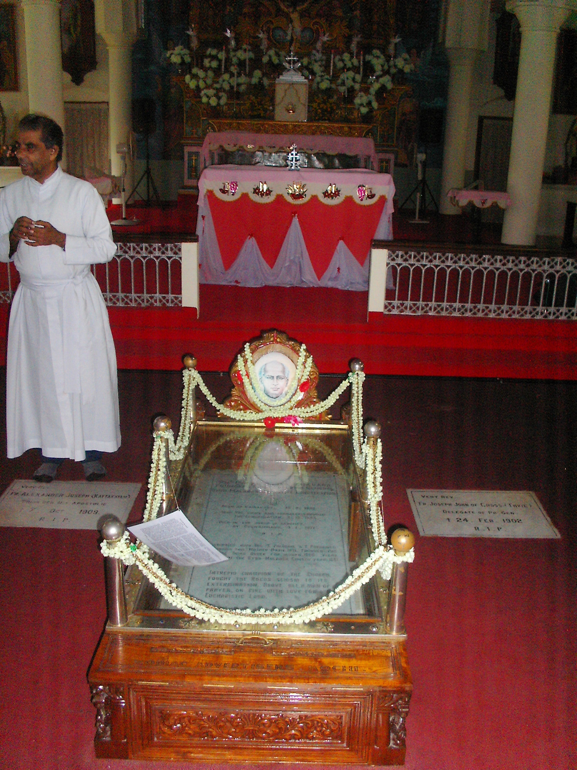 Grab des Seligen Kuriakose Elias Chavara in Mannanam, Kerala, Indien